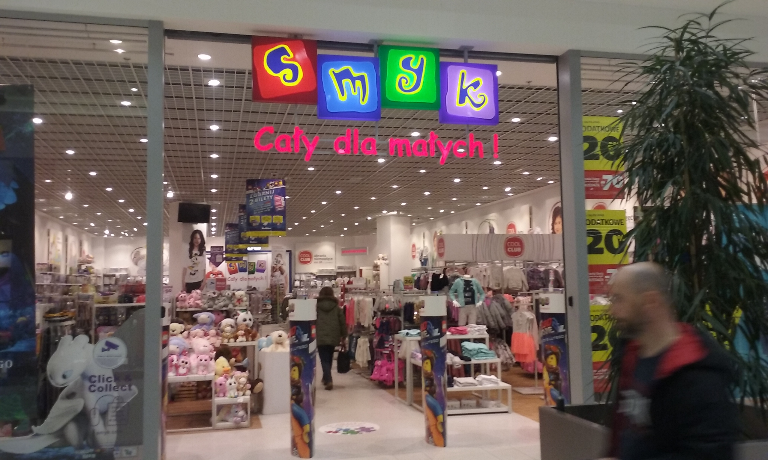 Salon odzieżowo-zabawkarski Smyk w 60-tysięcznym Tomaszowie Mazowieckim